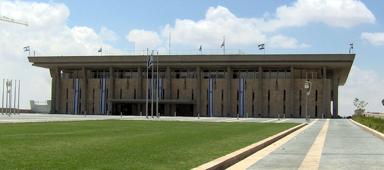 The Knesset Building in Jerusalem, Israel